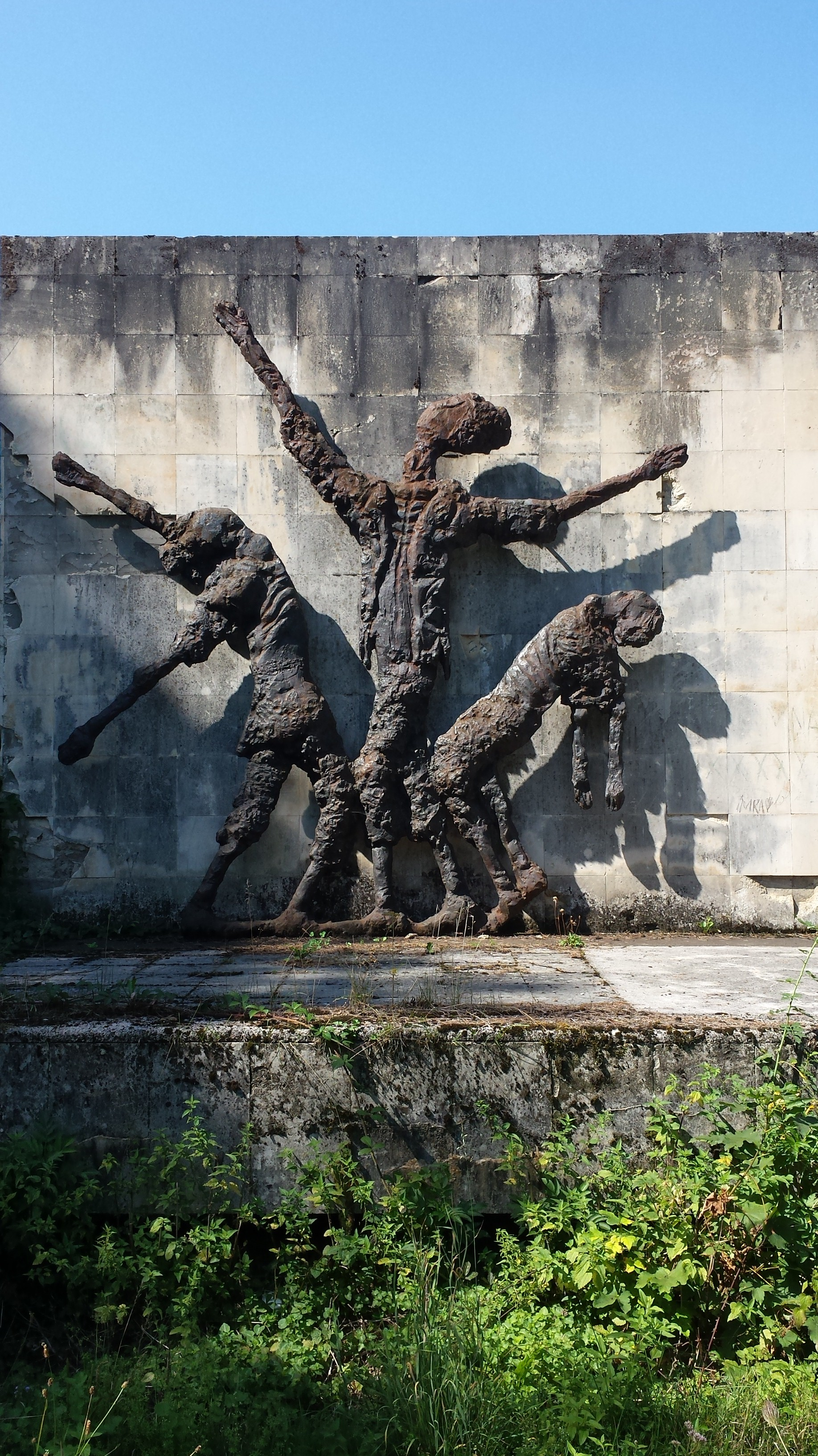 Spomenik u bivšem koncentracionom logoru Kruščica u Vitezu, Bosna i Hercegovina